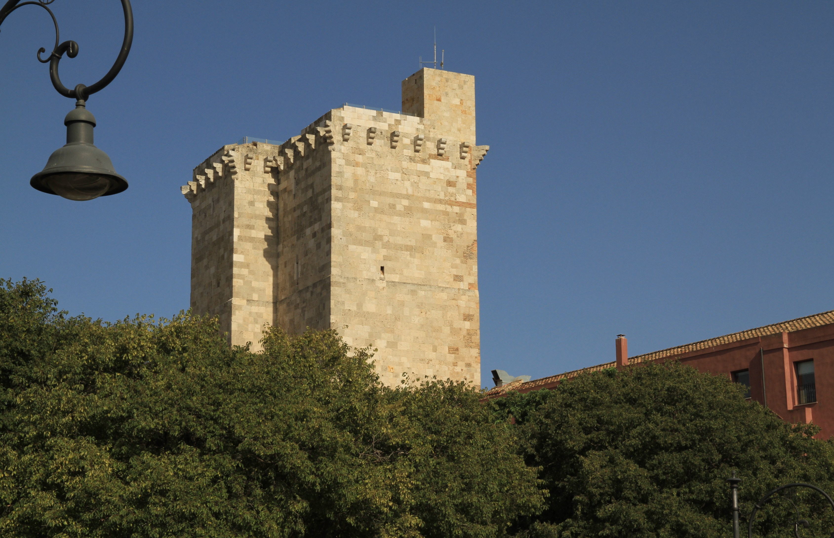 Cagliari Castello Torre Pancrazio, Cagliari, Sardinia, Italy